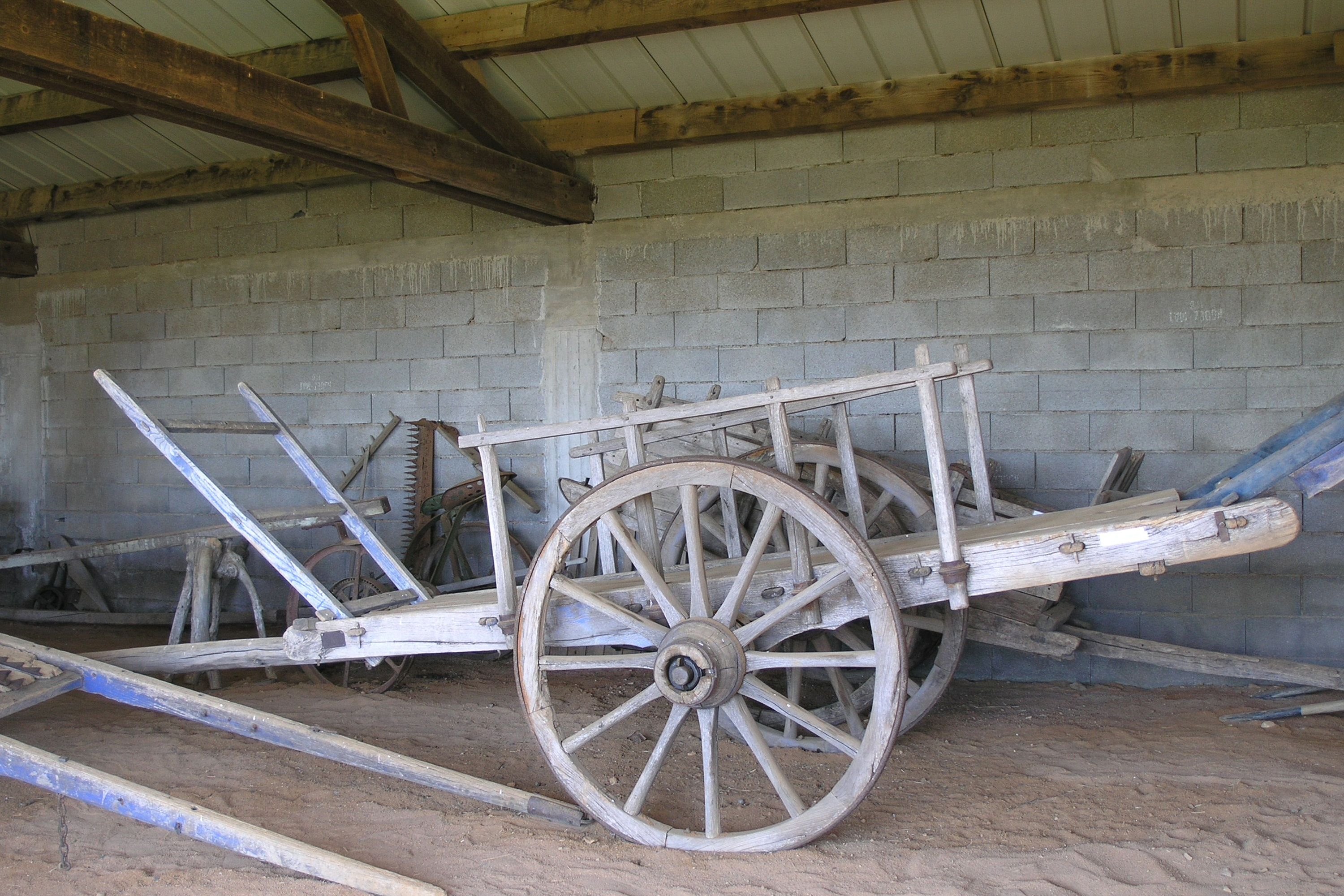 Cart horse Cévennes France.